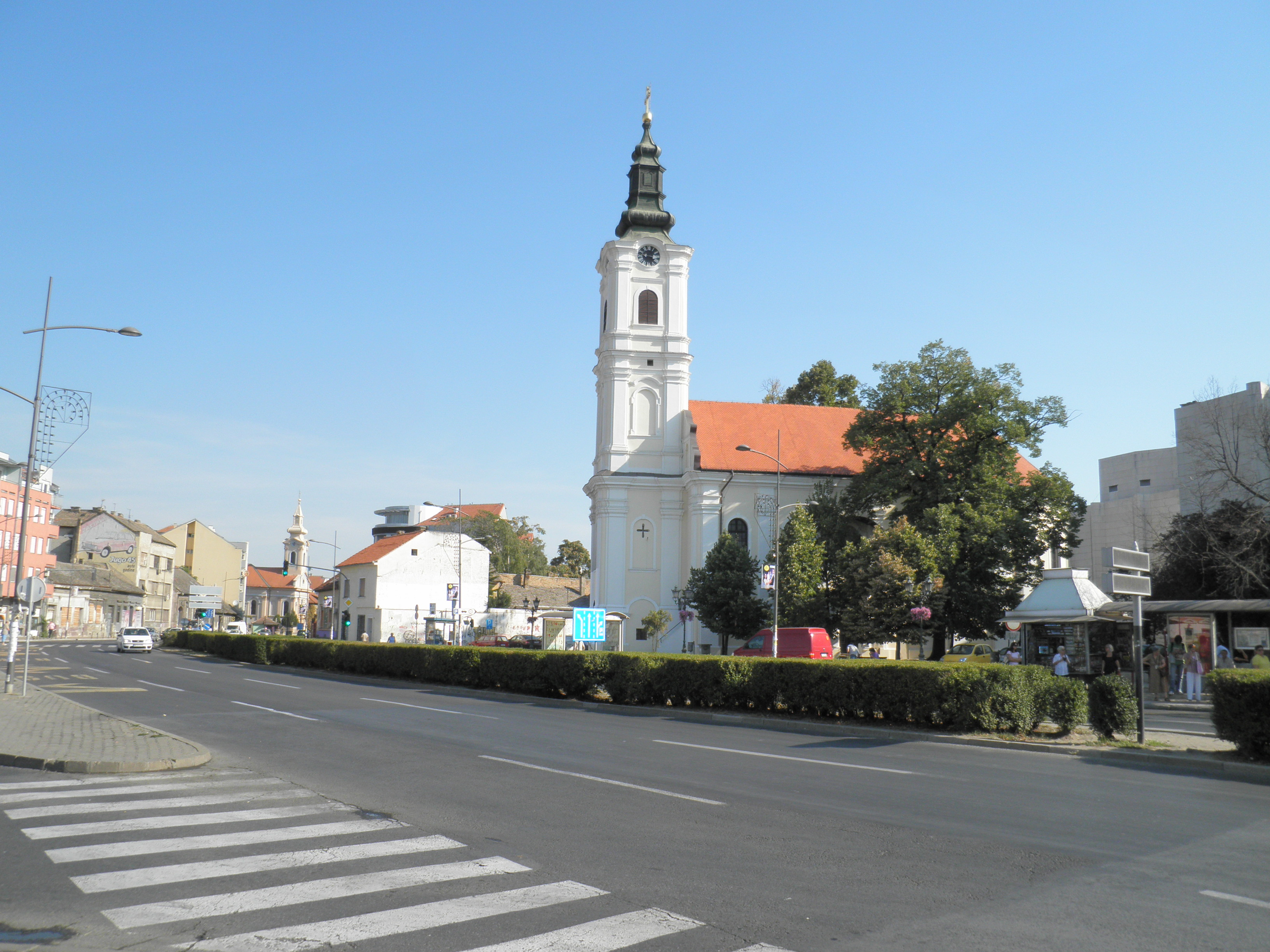 Srpska pravoslavna Uspenska crkva